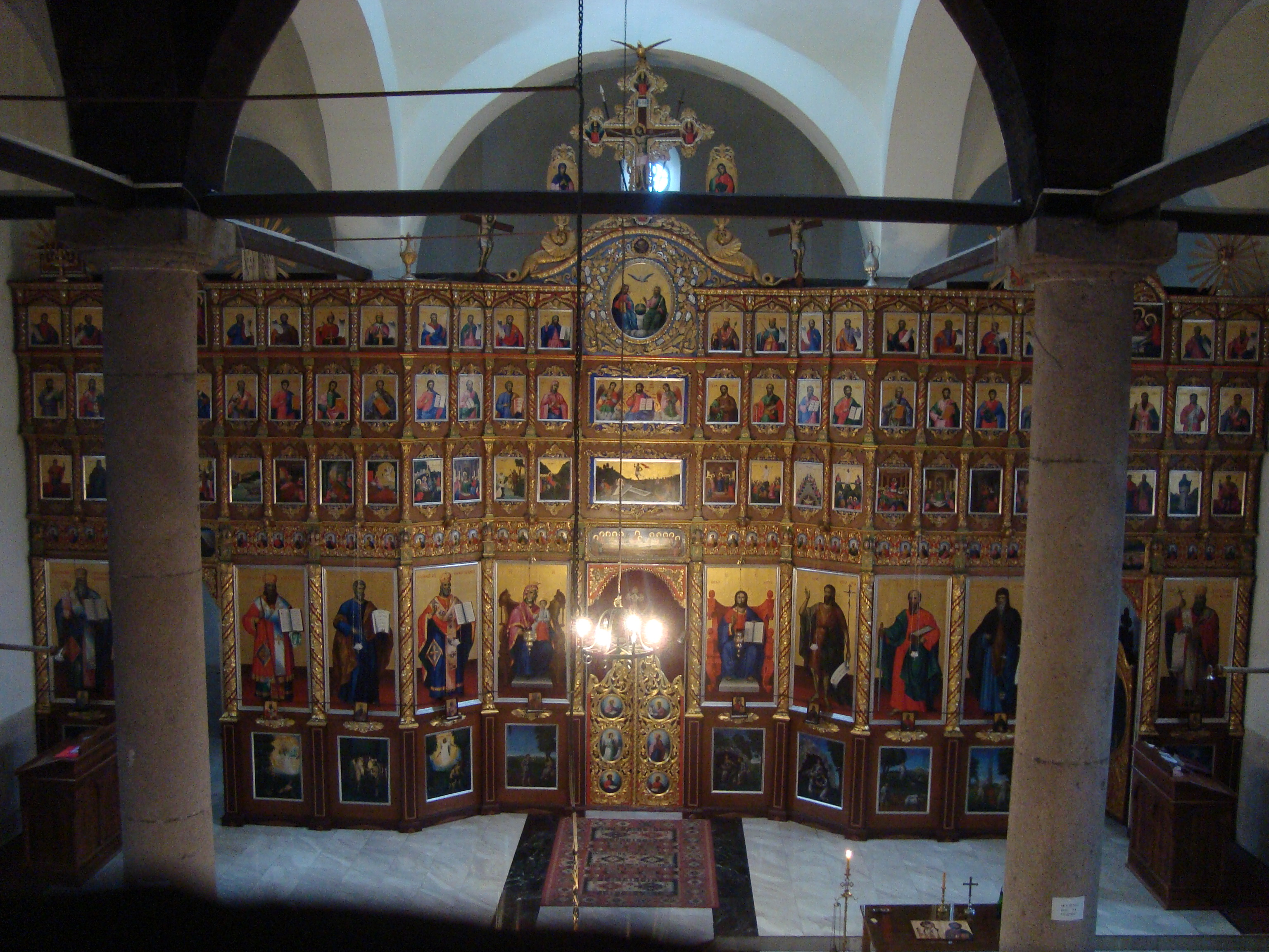 Црква Светог Николе, Нови Пазар, изграђена 1871. године, унутрашњост, иконостас израђен 1876. године.